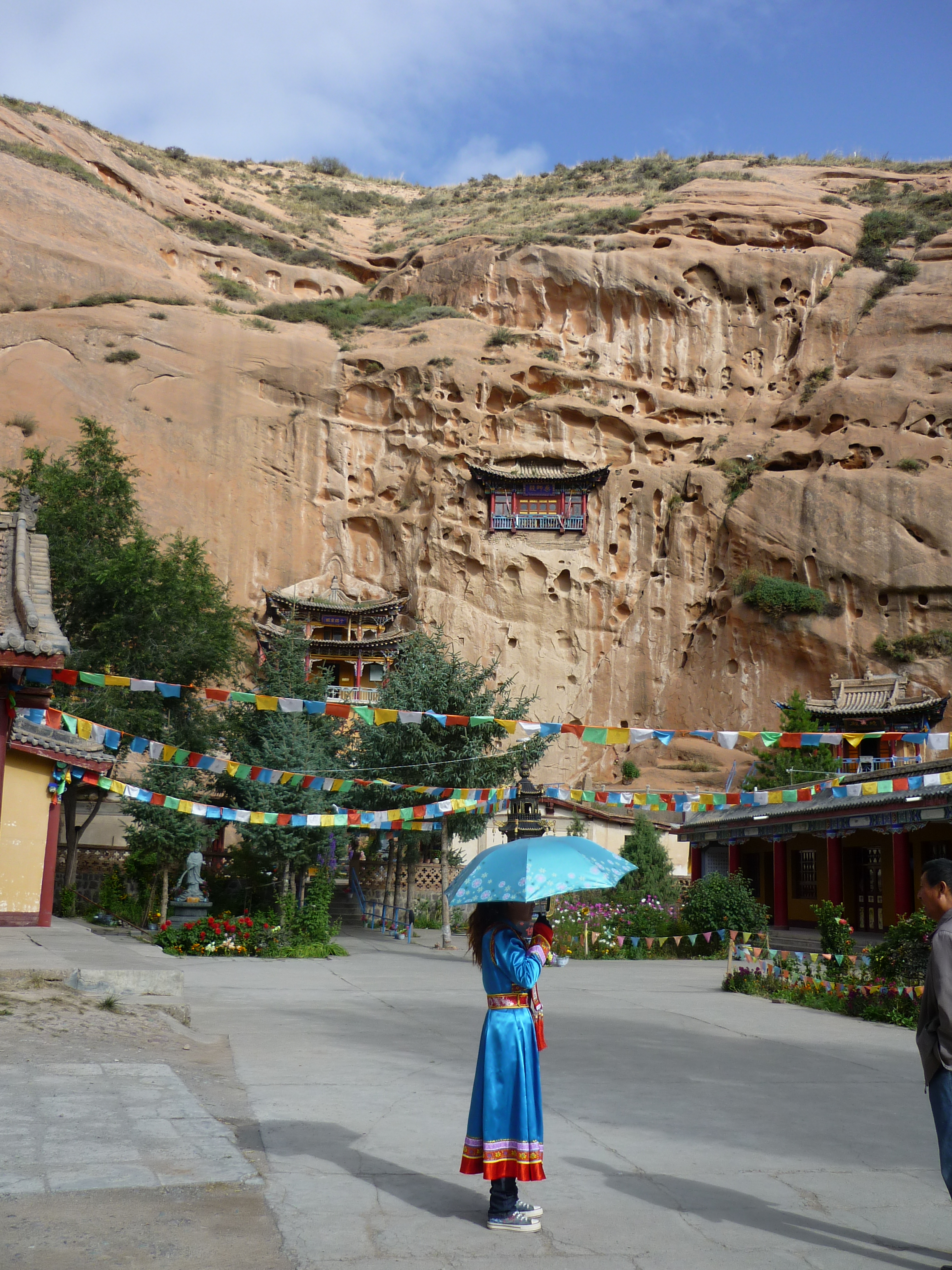 Die Matisi-Grotten (马蹄寺石窟群) sind buddhistische Höhlentempel am Westufer des Mati-Flusses bei der Stadt Zhangye in der chinesischen Provinz Gansu.